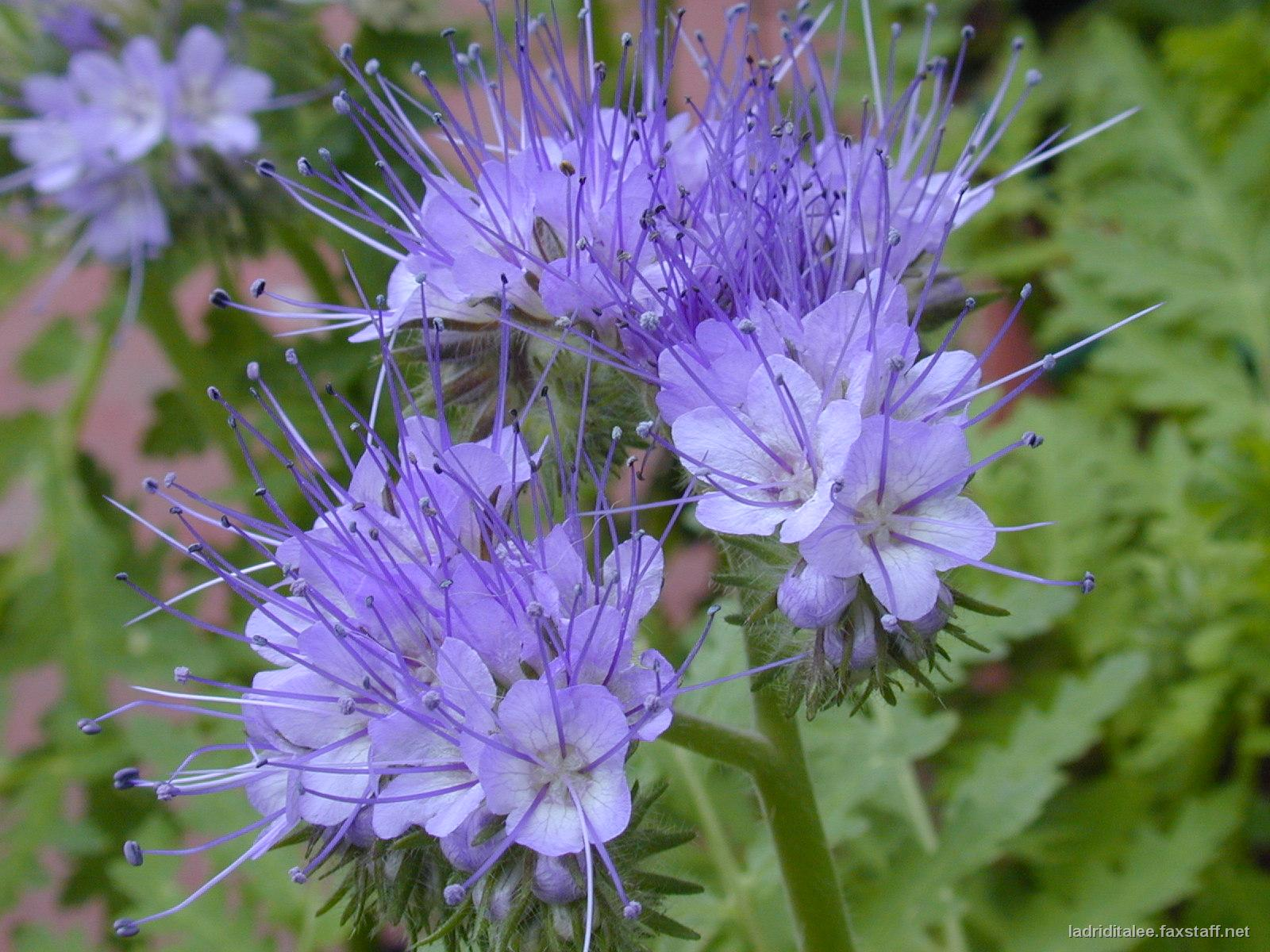 Phacelia tanacetifolia Lacy Phacelia